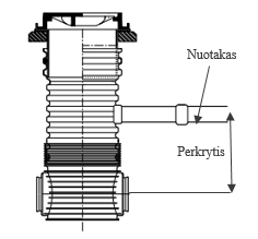 Plastikinis šulinys be kritimo stovo